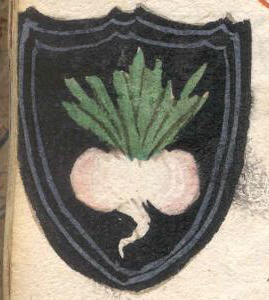 Wappen Salzburger Erzbischöfe aus der Salzburgischen Chronik bis 1587 (für frühe Bischöfe sicherlich apokryph), Universitätsbibliothek Salzburg; Leonhard von Keutschach